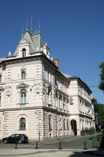 Hotel Tisza Szeged